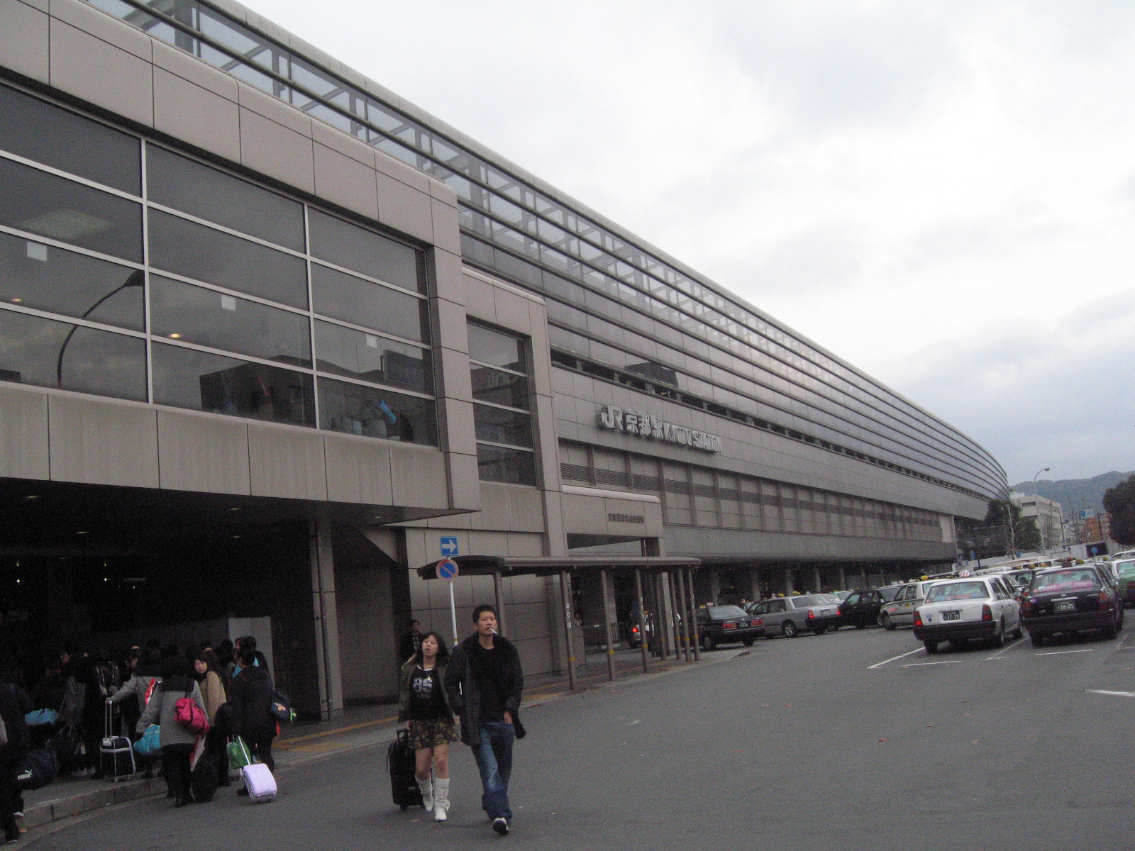 Kyoto Station, Kyoto, Kansai Region.